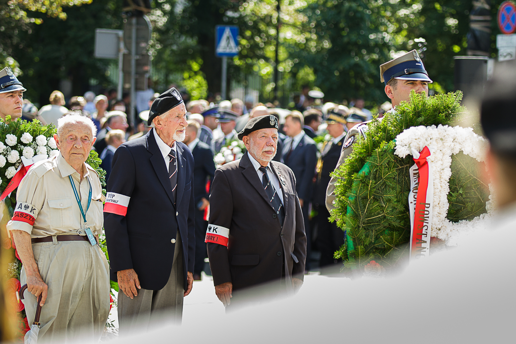 Powstańcy warszawscy Eugeniusz Tyrajski, Leszek Żukowski i Zbigniew Galperyn przy Pomniku Armii Krajowej i Polskiego Państwa Podziemnego w Warszawie, 73. rocznica powstania warszawskiego.